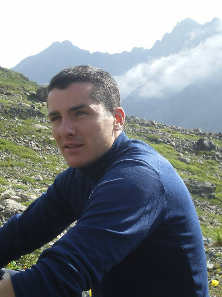 Cédric Gras, écrivain français (1982 - )